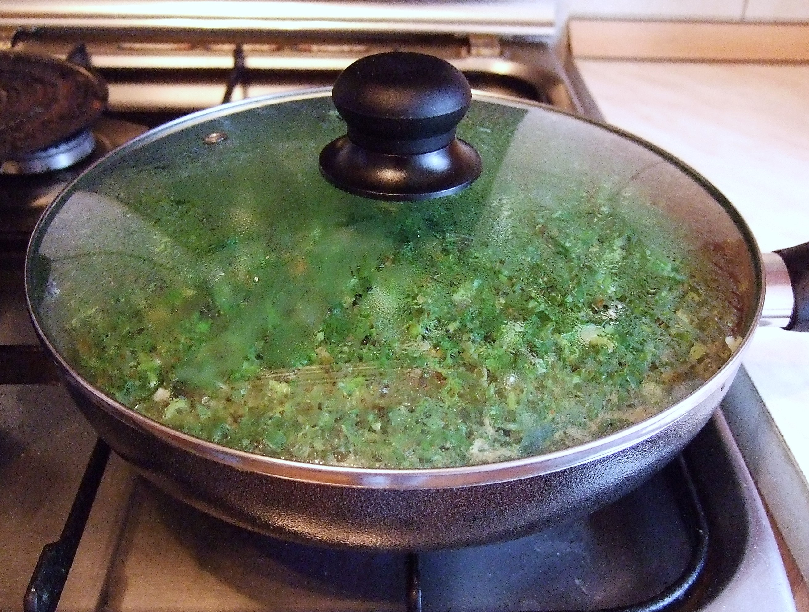 Քուքու ուտեստը, որը պարսկահայերը պատրաստում են յատկապէս Ջրօրհնեքին և Զատկին ընդառաջ գիշեր, երբ մատուցւում է փլաւի և աղի ծխացած ձկան հետ միասին